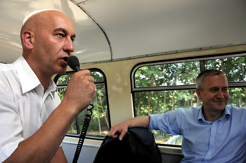 Posłowie Tadeusz Arłukowicz i Robert Tyszkiewicz urządzili w ramach akcji "Polska w budowie" wycieczkę starym "ogórkiem"